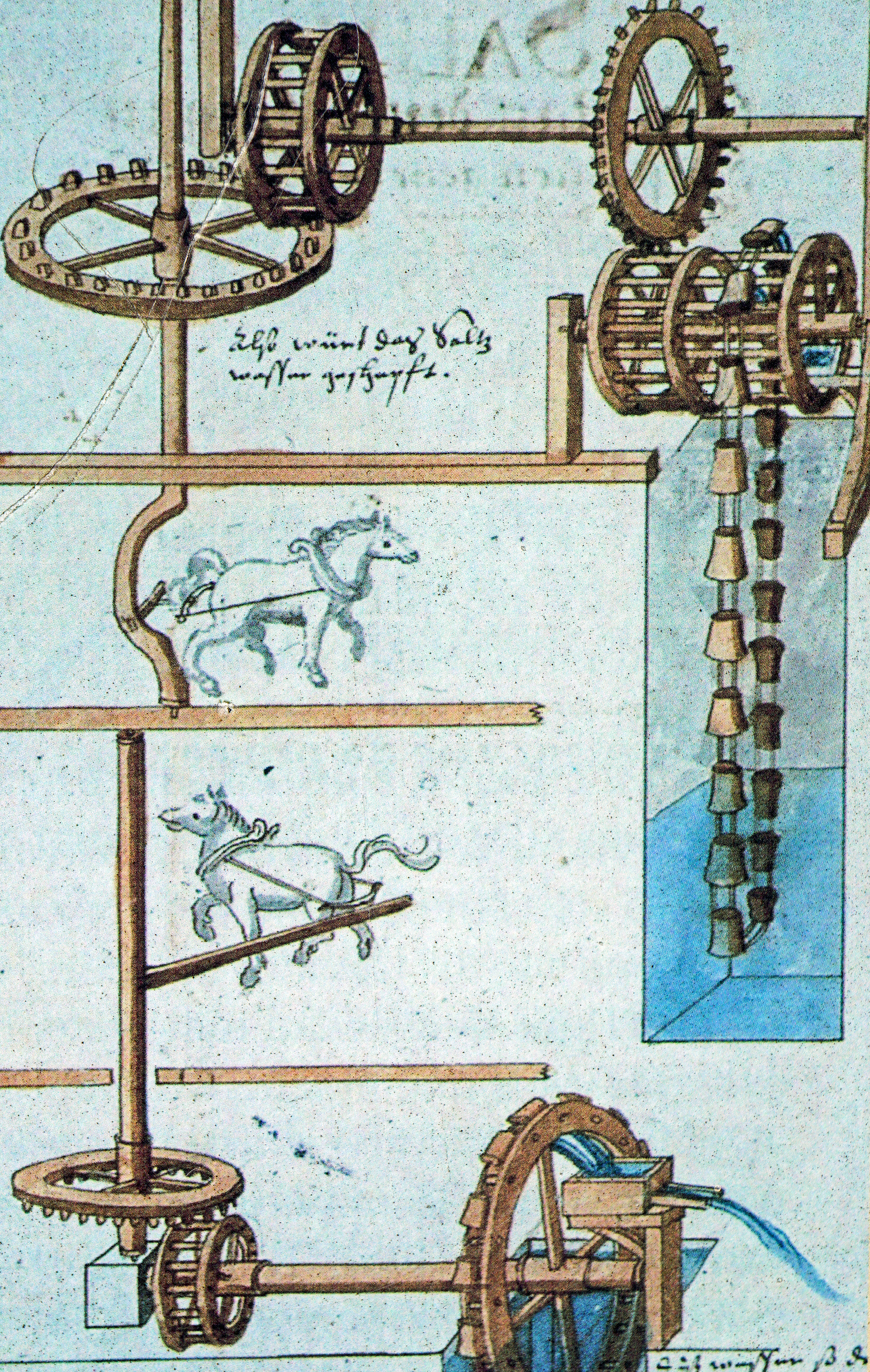 Wasserschöpfwerk mit Pferdeantrieb für die Saline Salins-les-Bains (kolorierte Federzeichnung).